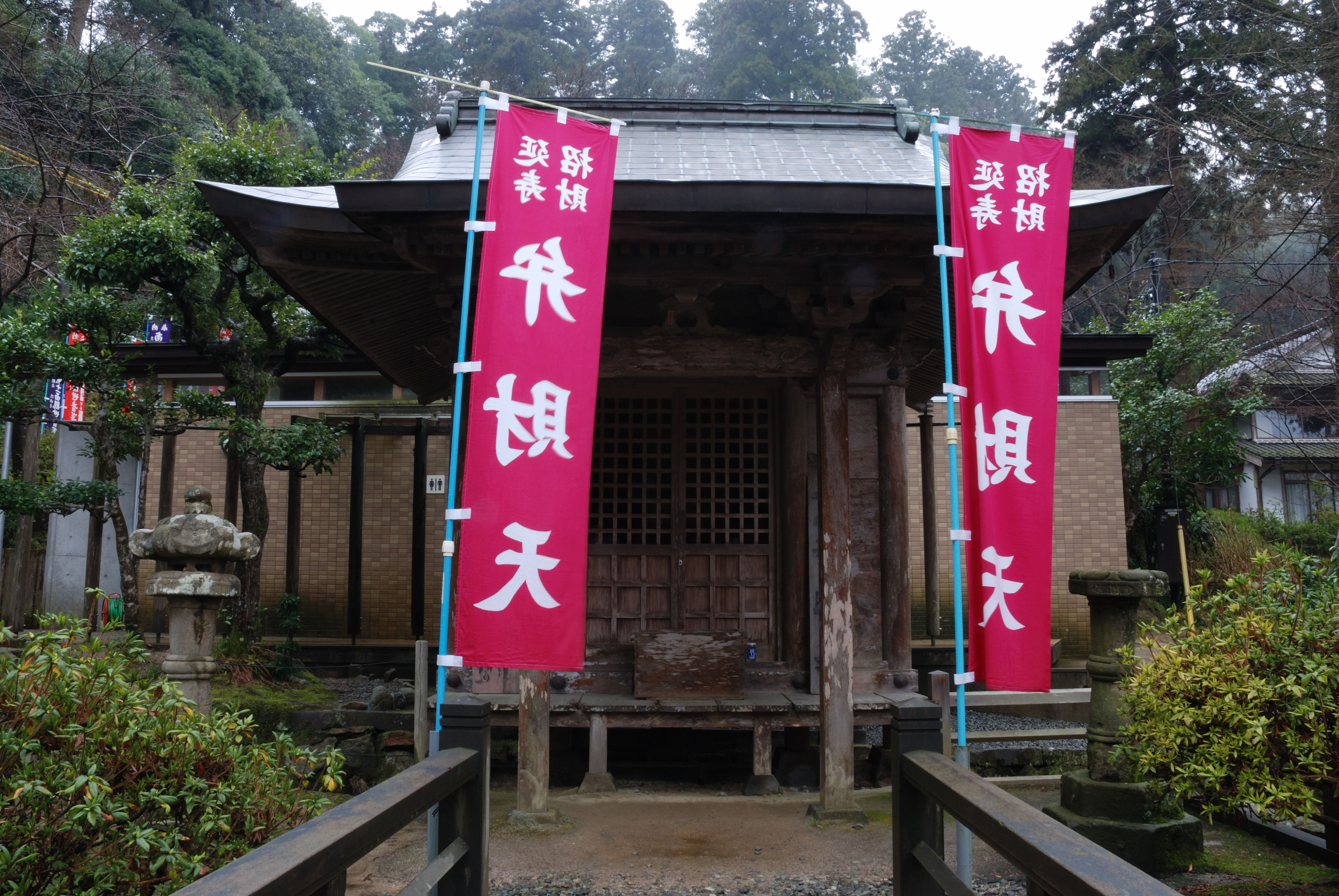 Kiyomizu-dera benzaitendo